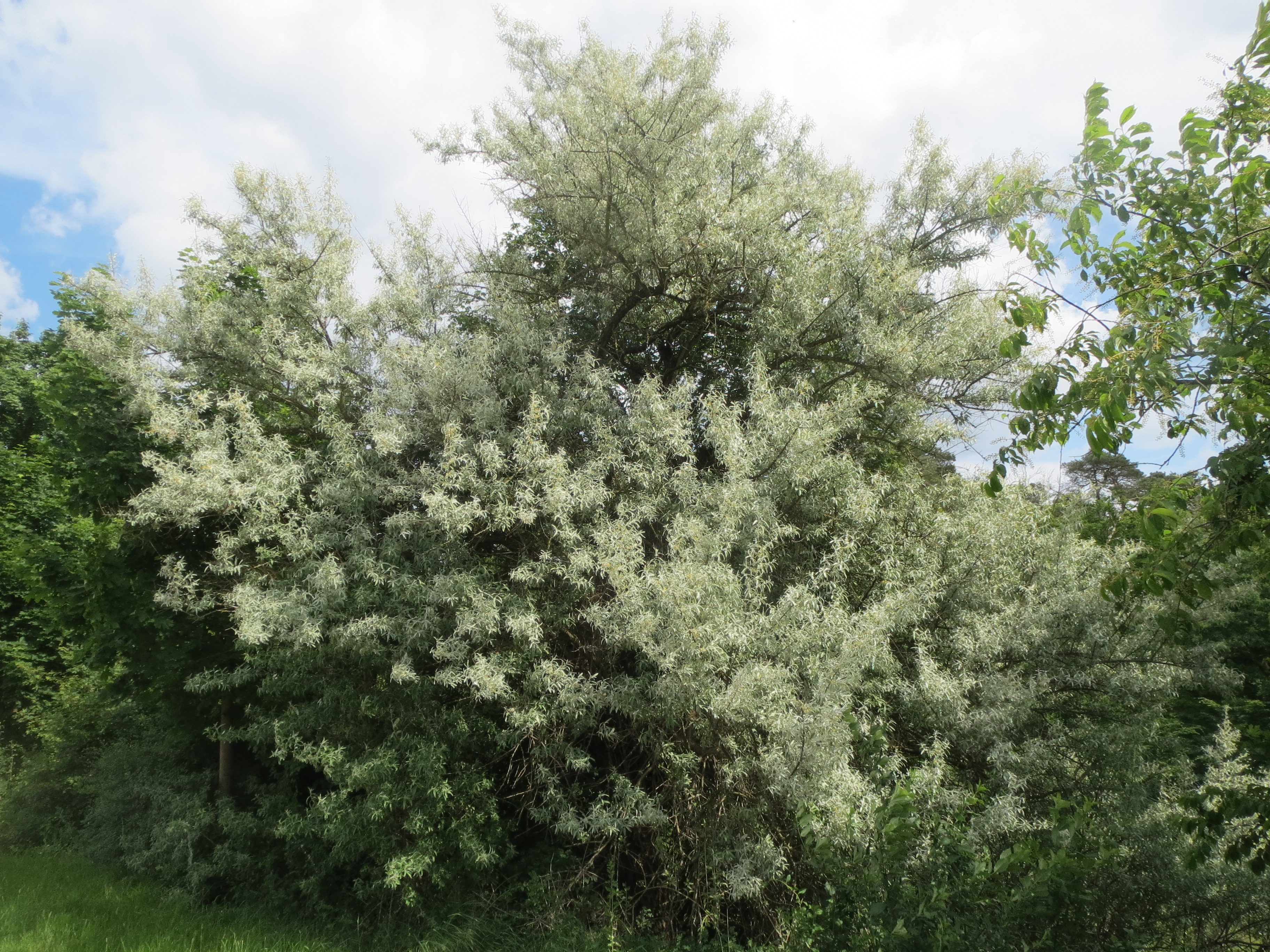 Schmalblättrige Ölweide (Elaeagnus angustifolia) im Schwetzinger Hardt, invasiv am Autobahndamm